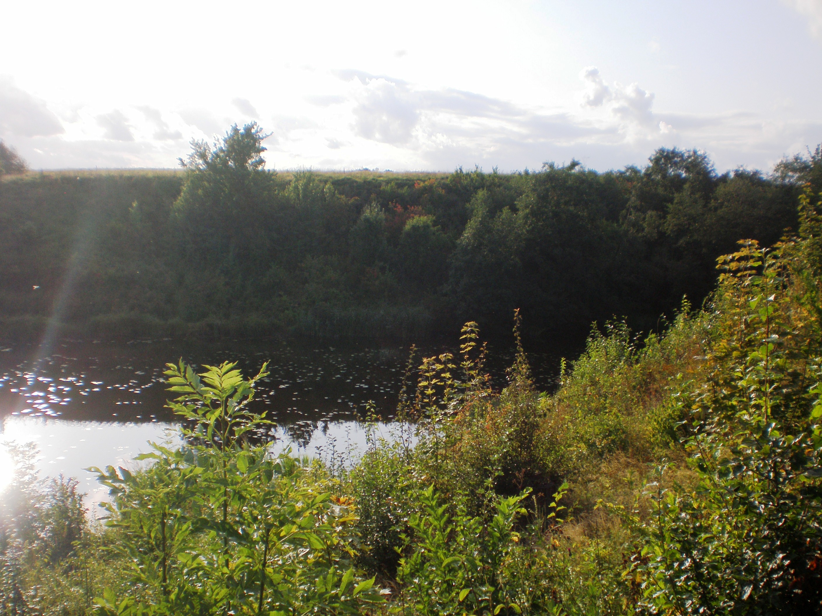 Pilsupio upelio žiotys, Kėdainių raj., Lietuva